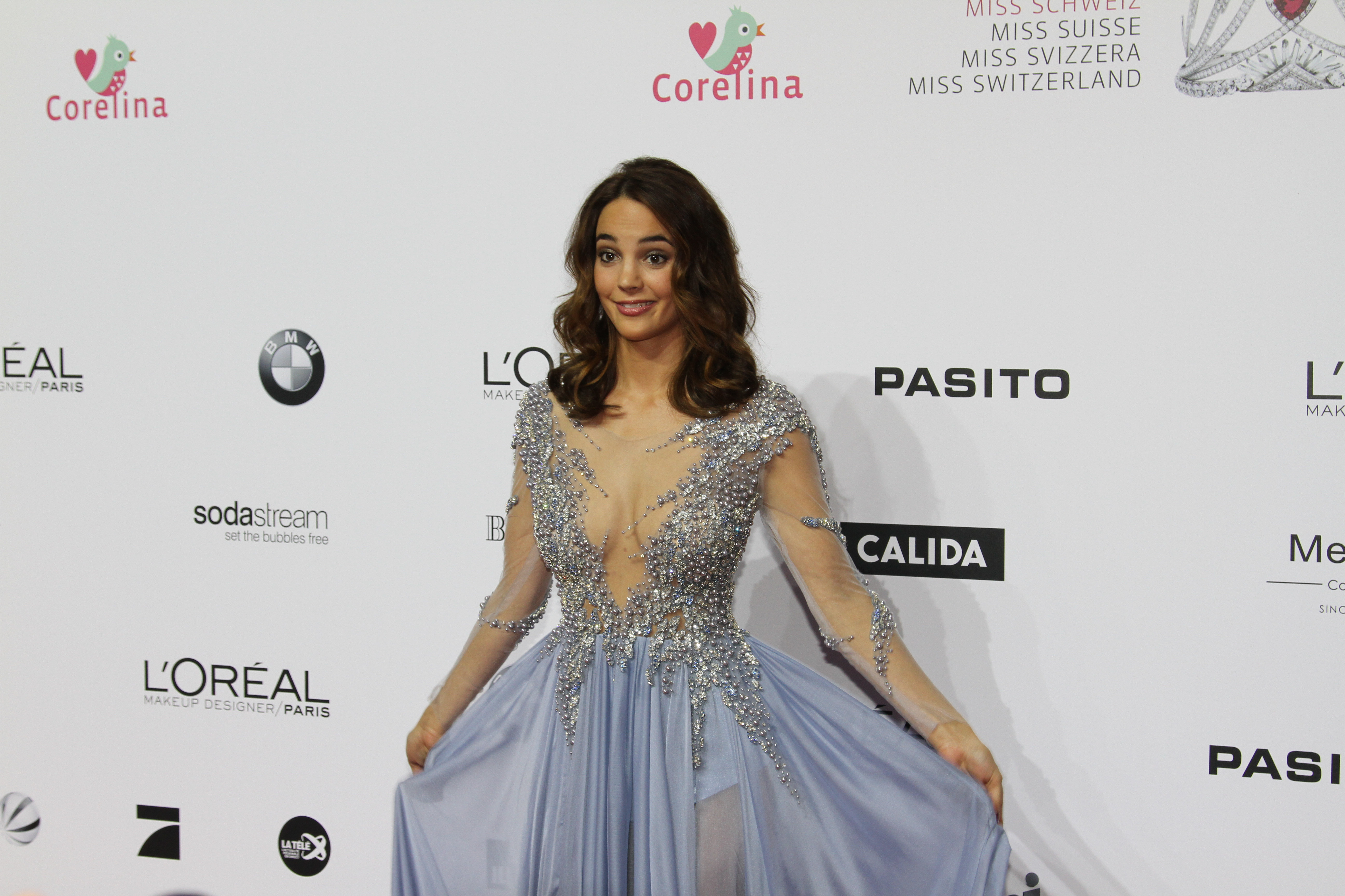 Laetitia Guarino, Miss Schweiz 2014, bei der Wahl der Miss Schweiz 2015